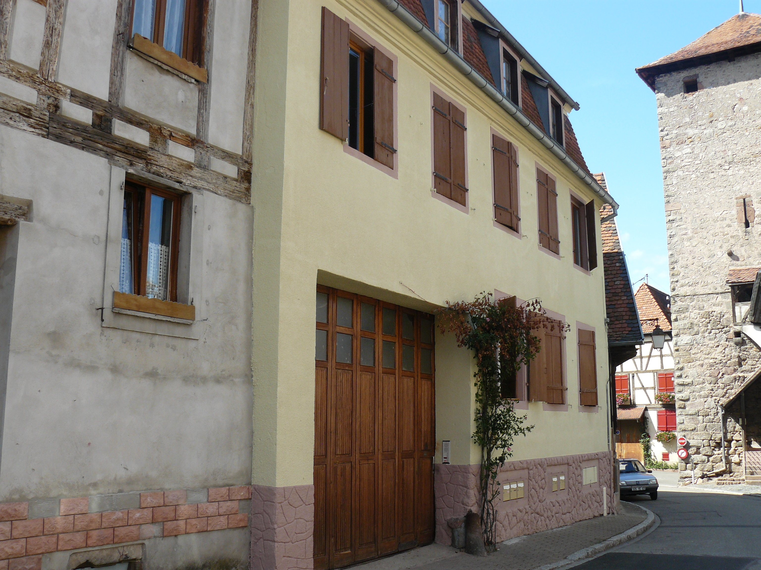 Maison natale de Théophile Bader, fondateur des galeries Lafayette né à Dambach-la-Ville en 1864